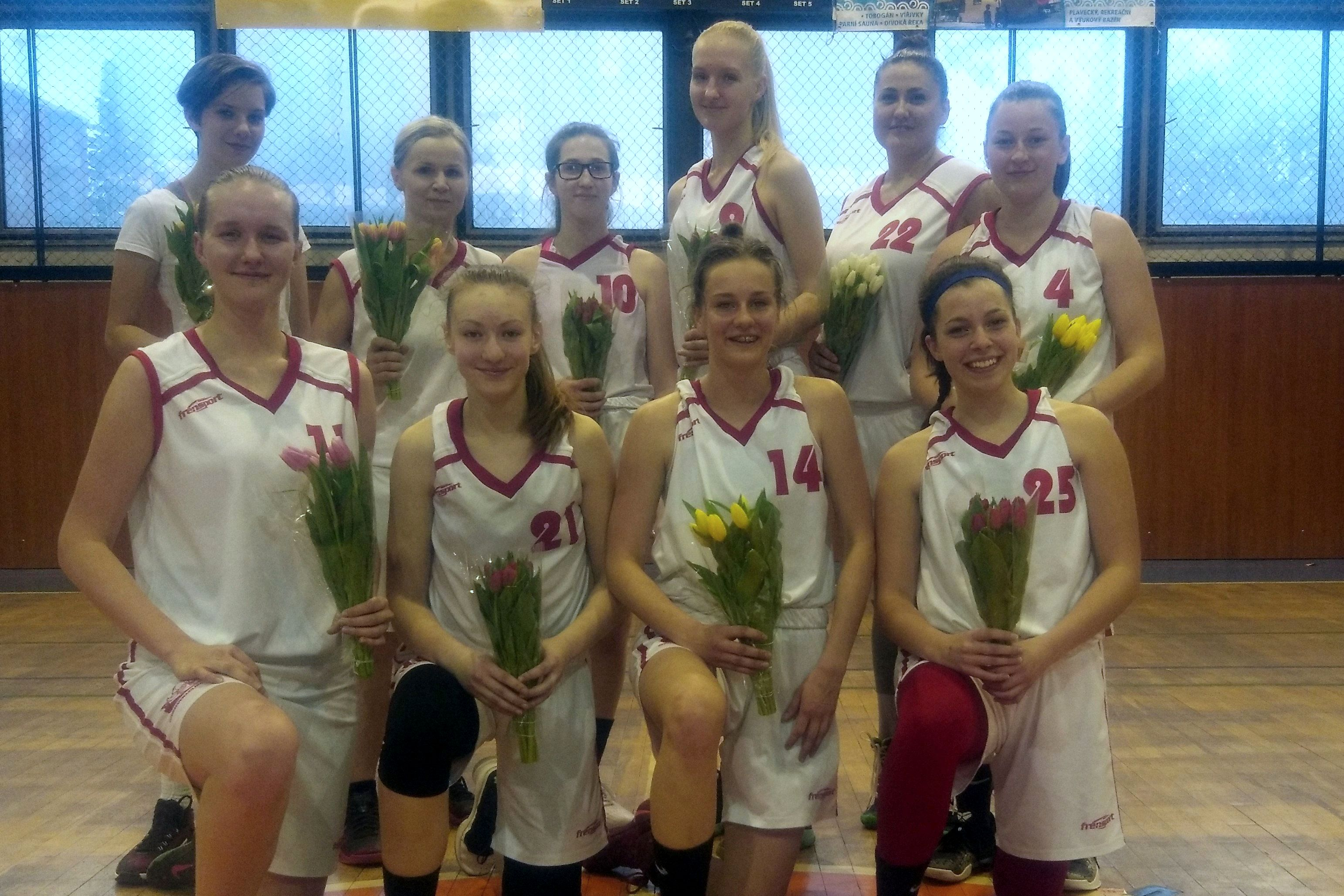 Družstvo žen "B" v sezóně 2017/2018 obsadilo 1.místo v Severomoravské lize žen.